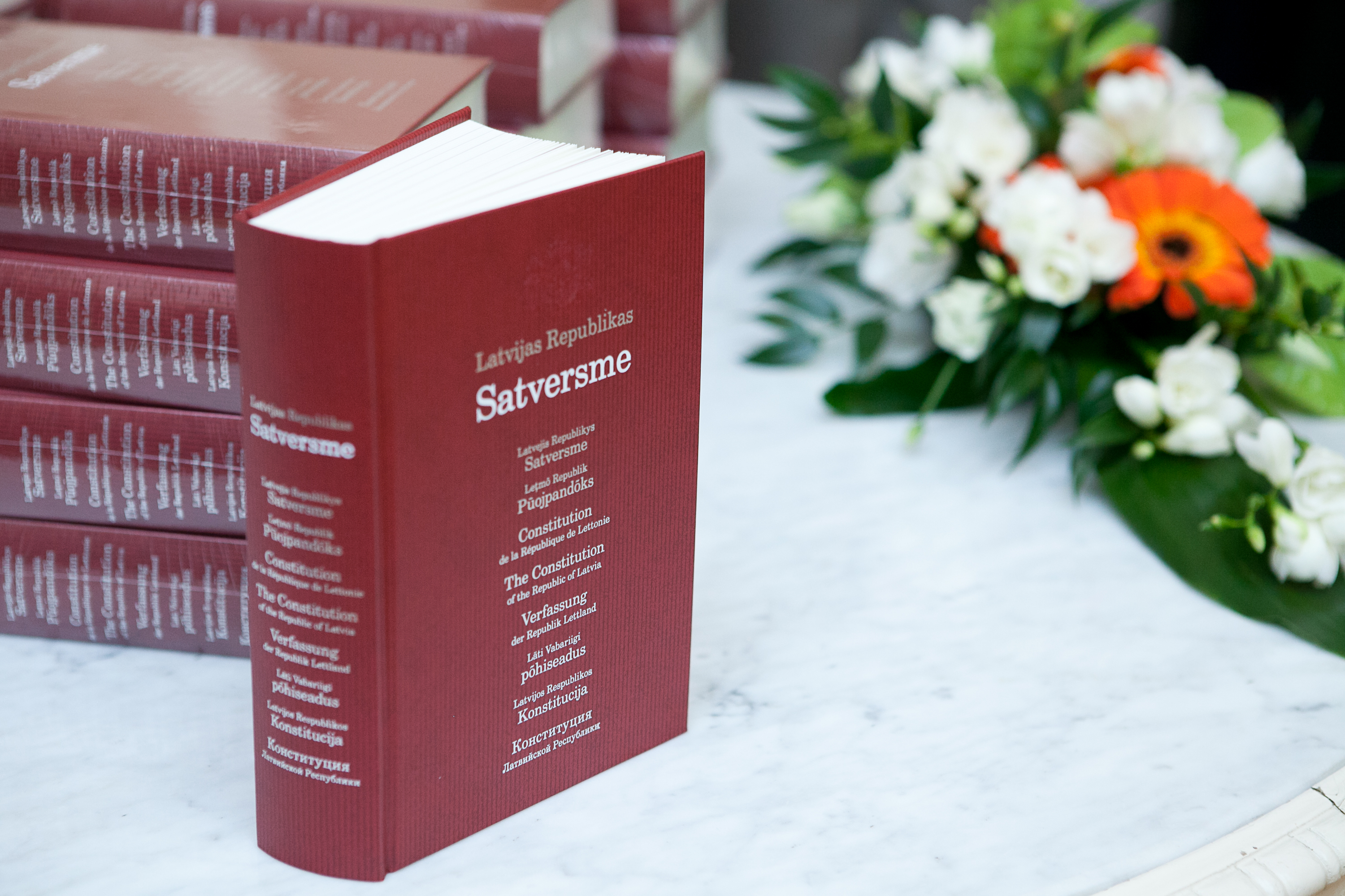 2012.gada 13.jūnijs. Satversmes jubilejas izdevuma atvēršanas svētki. Foto: Ernests Dinka, Saeimas Kanceleja